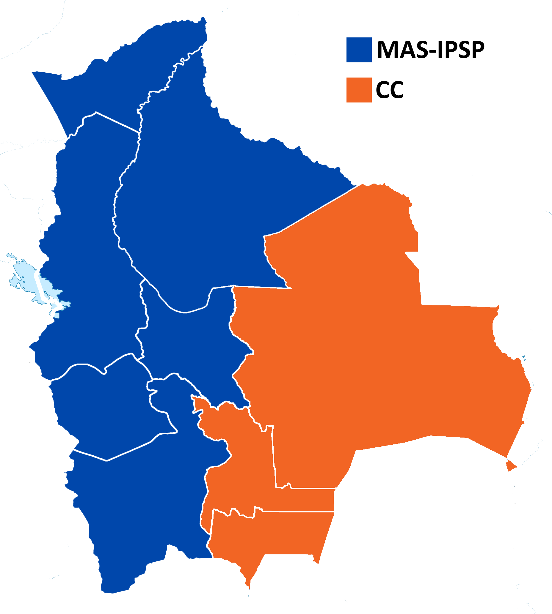 Mapa de vencedor por departamento en la elección presidencial boliviana de octubre de 2019.